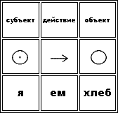 таблица порядка слов СВО